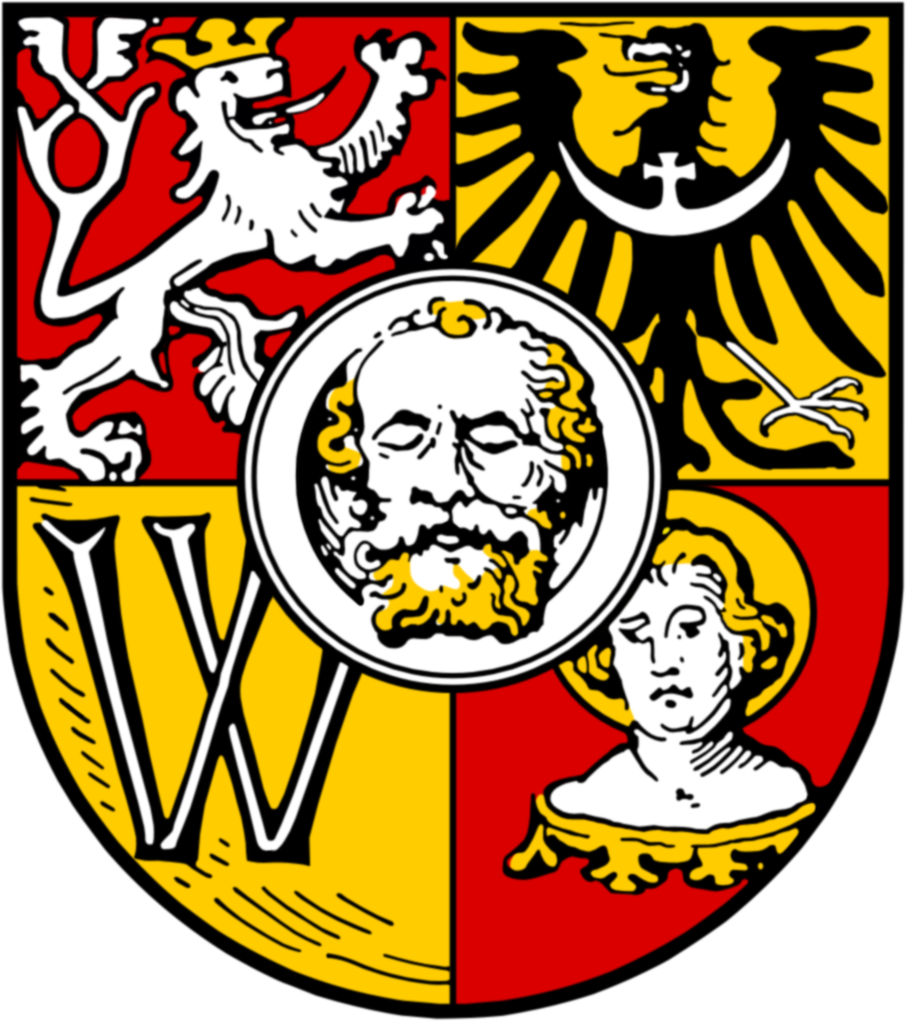 Wappen der Stadt Breslau. Schläsch: Woappa der Stoadt Brassel.